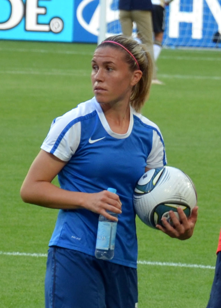 WM Vorrundenspiel zwischen Frankreich und Deutschland am 5. Juli 2011 im Borussiapark in Mönchengladbach